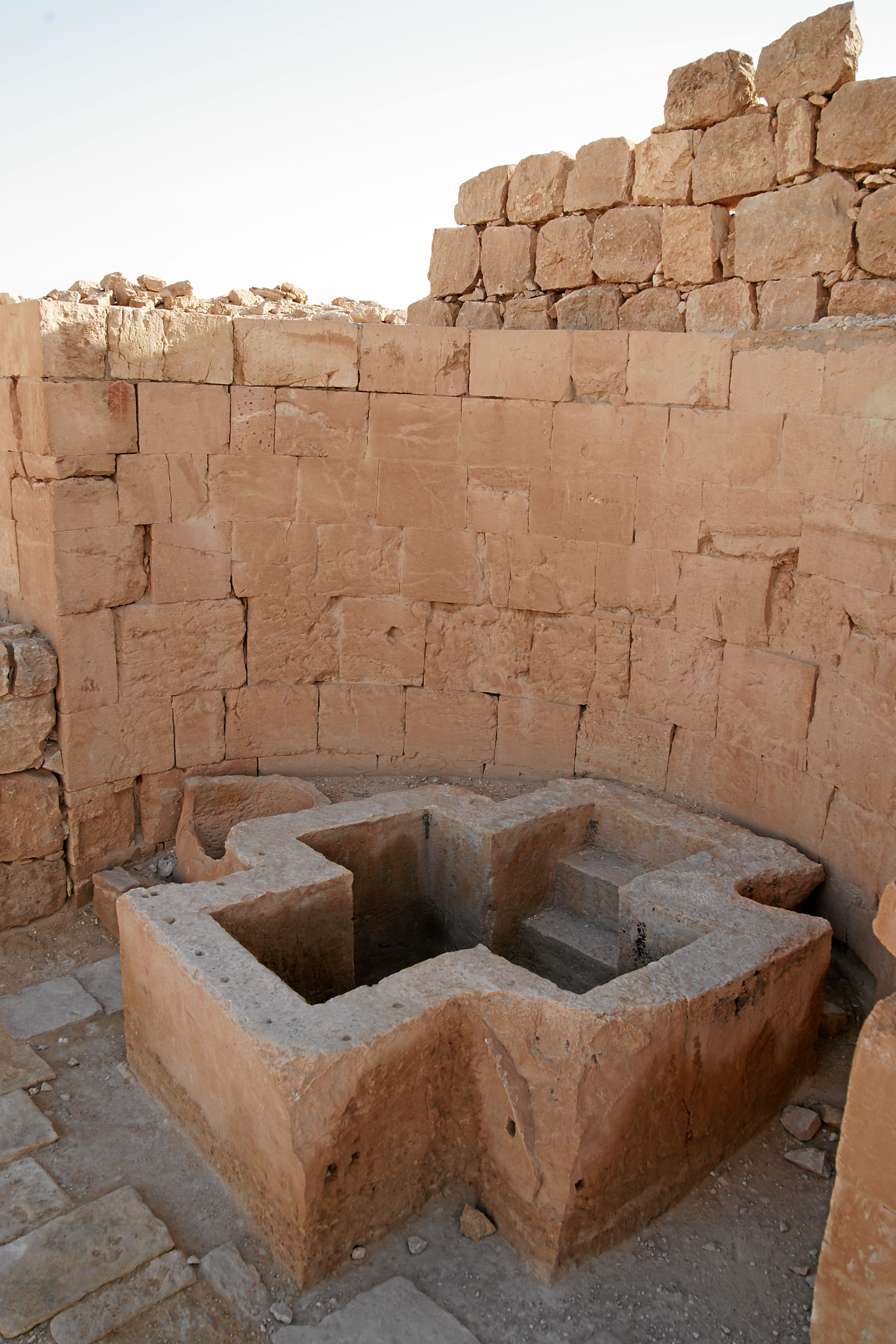 Shivta: Taufbecken in der Southern Church